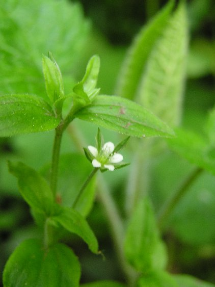 Moehringia trinervia in einem Schluchtwald im Neckartal bei Heidelberg.